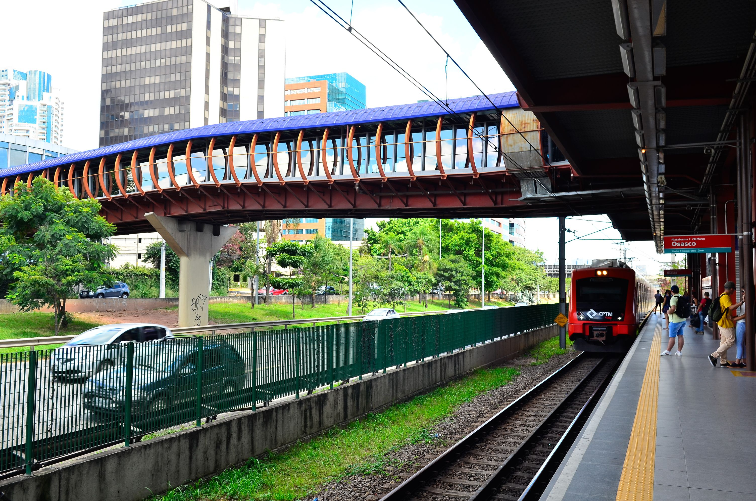 São Paulo - Integração entre o metrô Pinheiros e o trem da Linha Esmeralda.